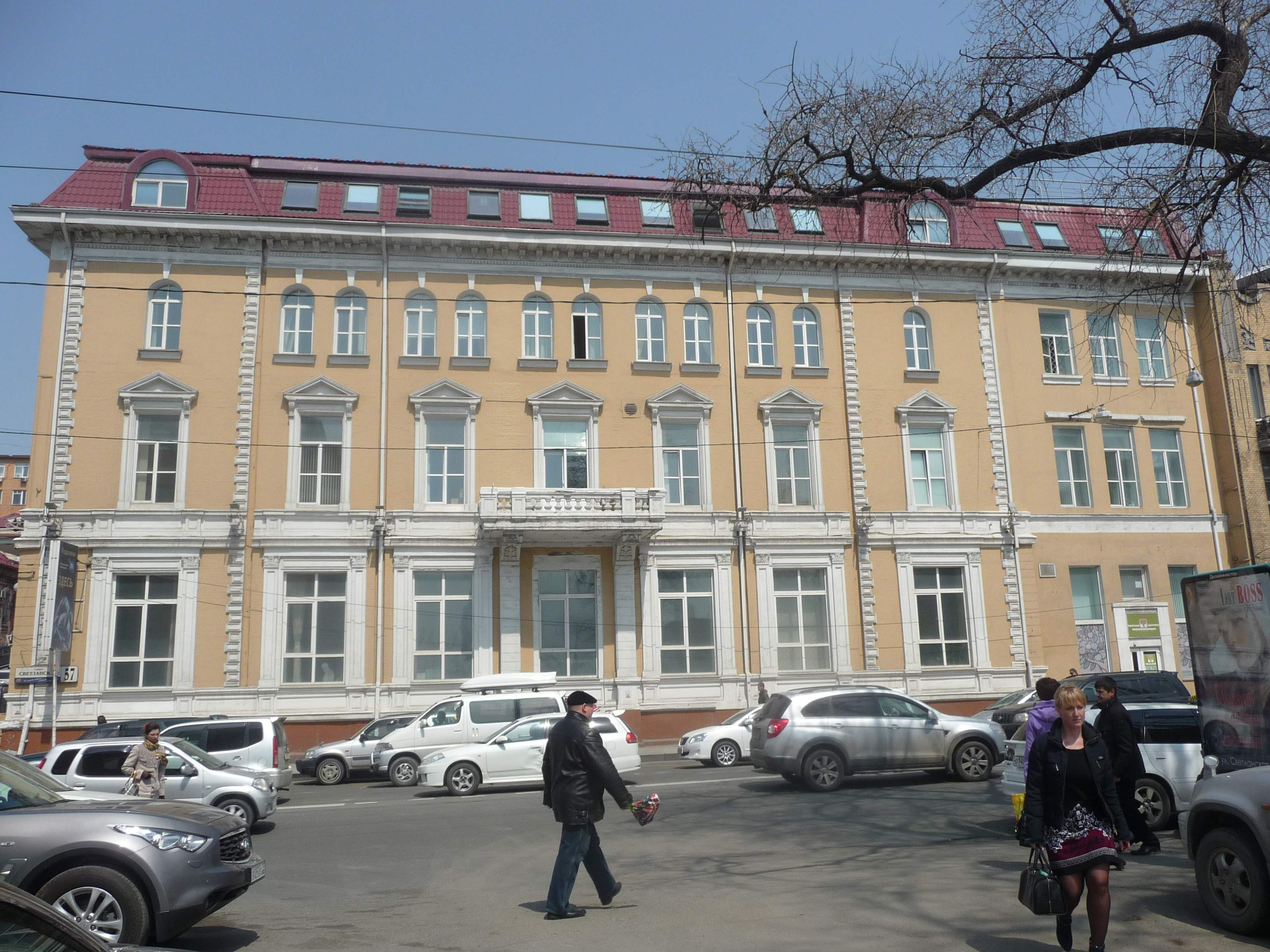 Владивосток,Светланская 57, офис «Дальсвязи»